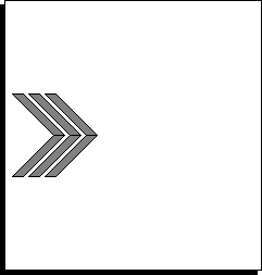 Beispielaufgabe Konzentration